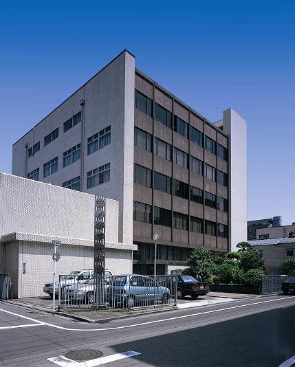 中ノ郷信用組合本店